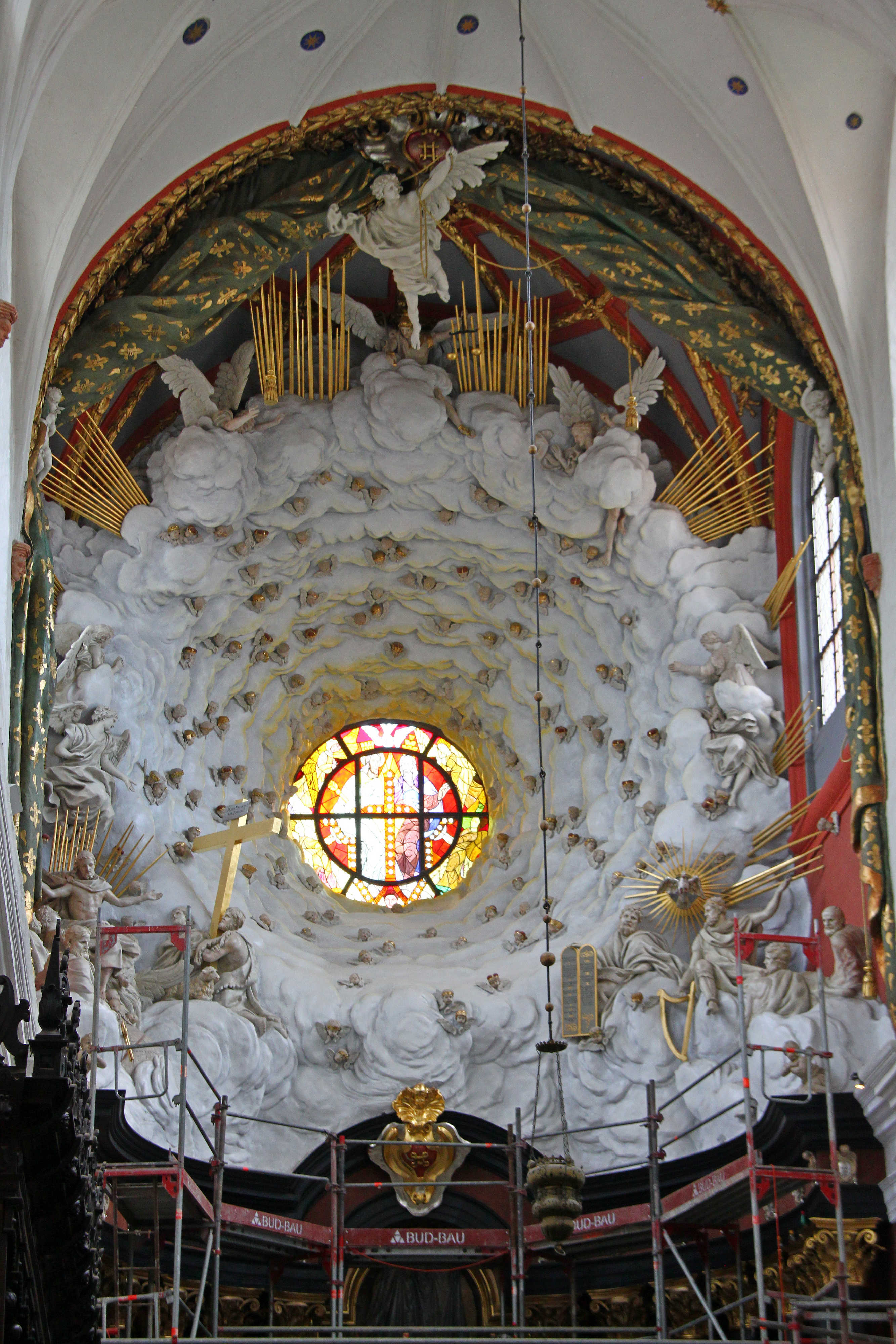 Gdańsk, kościół, ob. katedra p.w. św. Trójcy (katedra), 1 poł. XIII, 1350-1577, XVIII